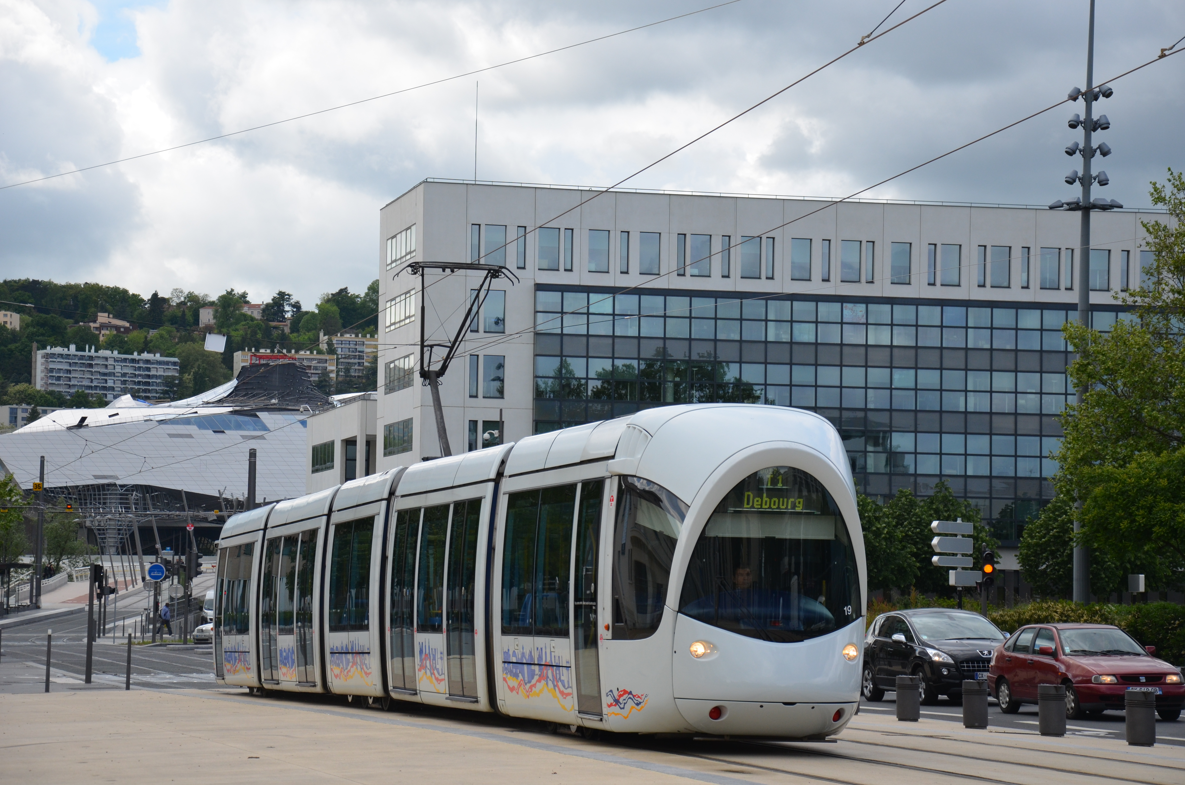 Alstom Citadis 302 n°819 près de la Halle Tony Garnier, sur le réseau TCL de Lyon